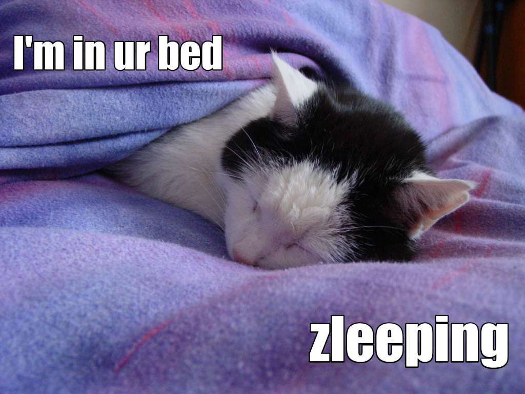 lolcat